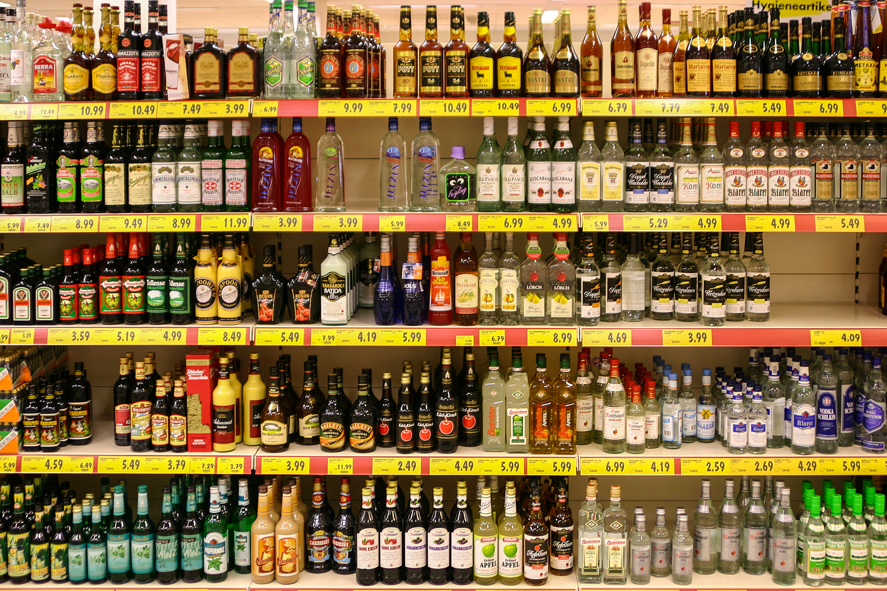 Spirituosen in einem Supermarktregal